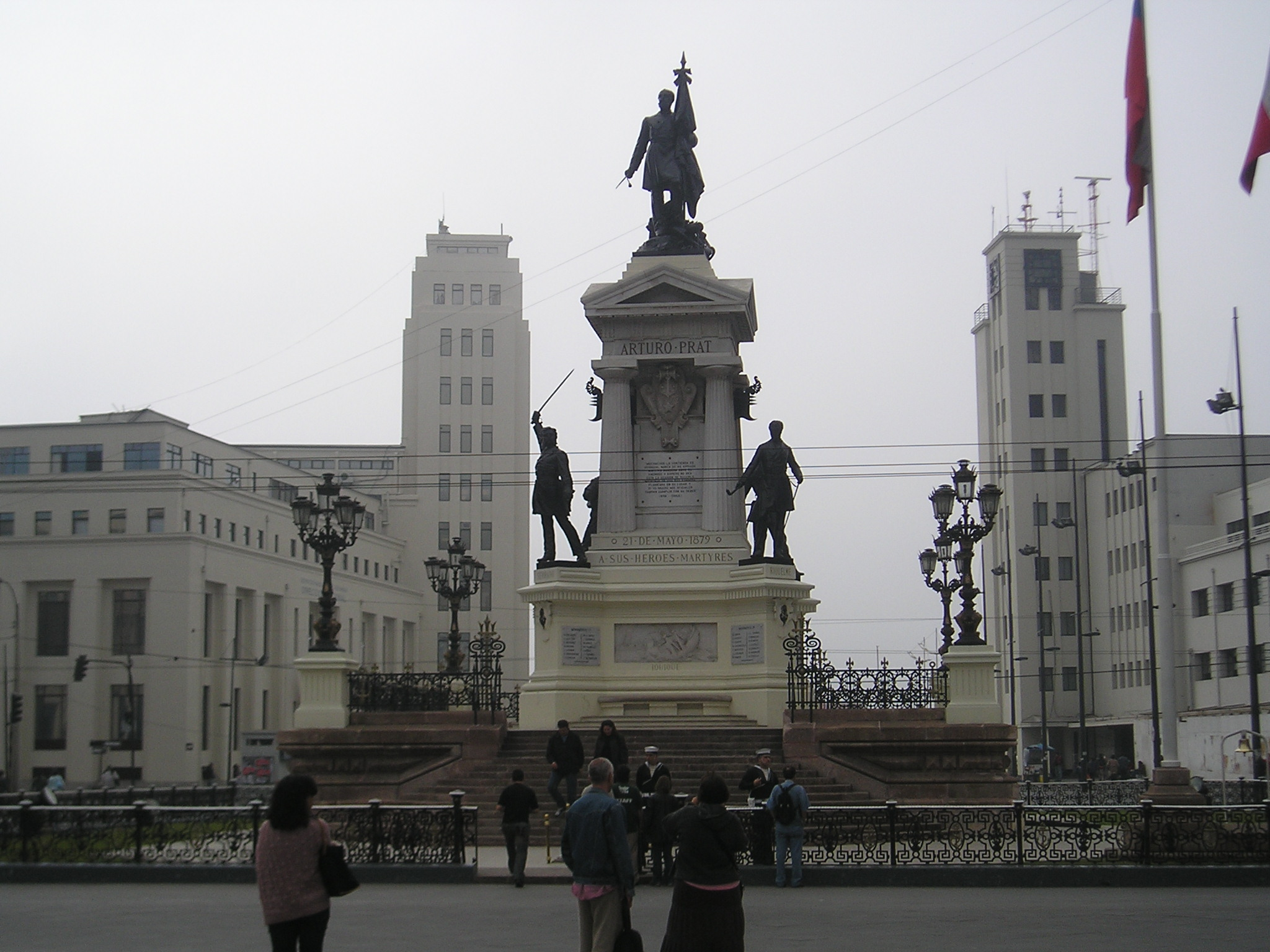 Valparaíso, Chile - Monumento a los Héroes de Iquique at Plaza Sotomayor